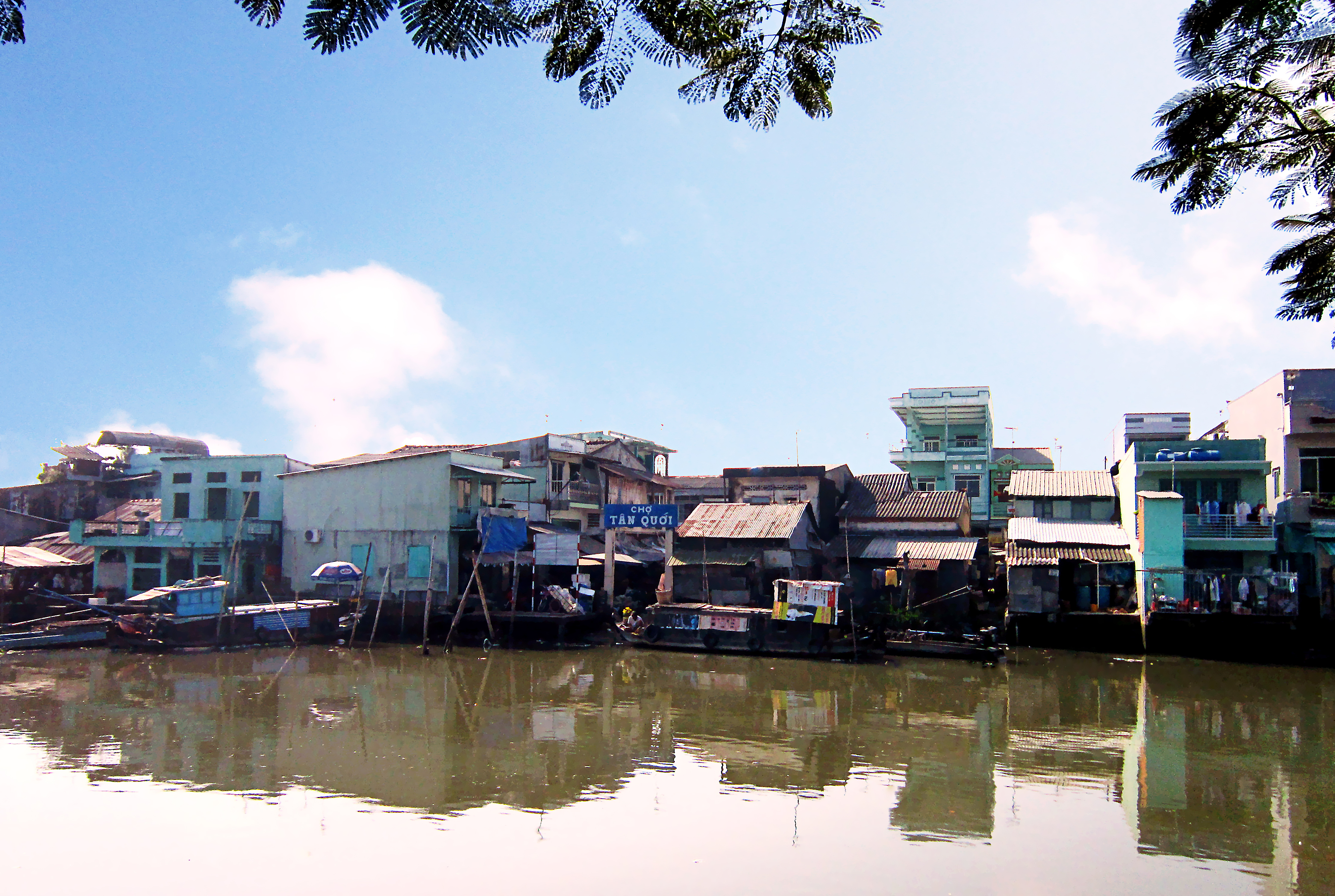 Chợ xã Tân Quới thuộc huyện Bình Tân, tỉnh Vĩnh Long, Việt Nam.